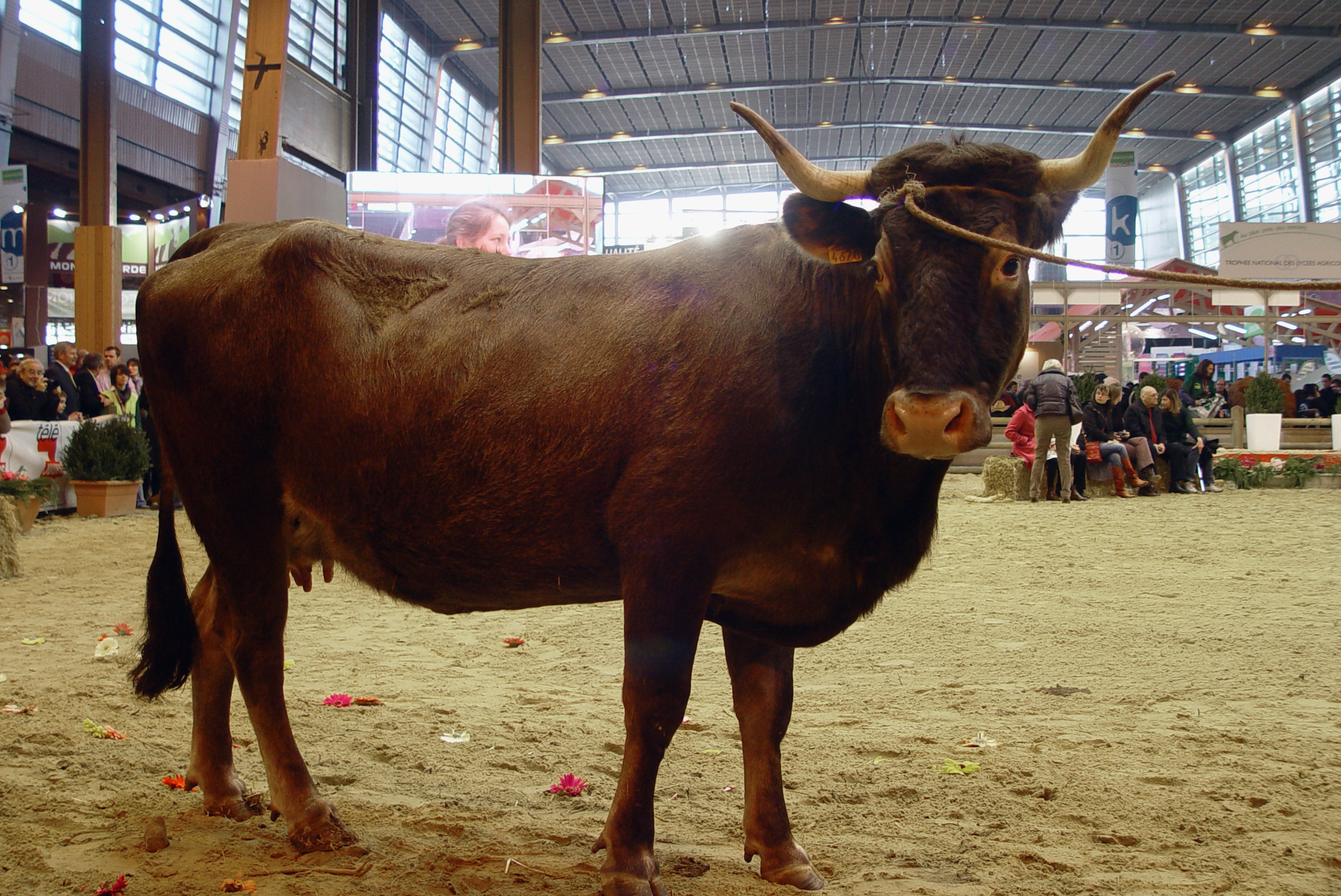 Urbane, vache Casta, exposée au salon de l'Agriculture, mars 2010